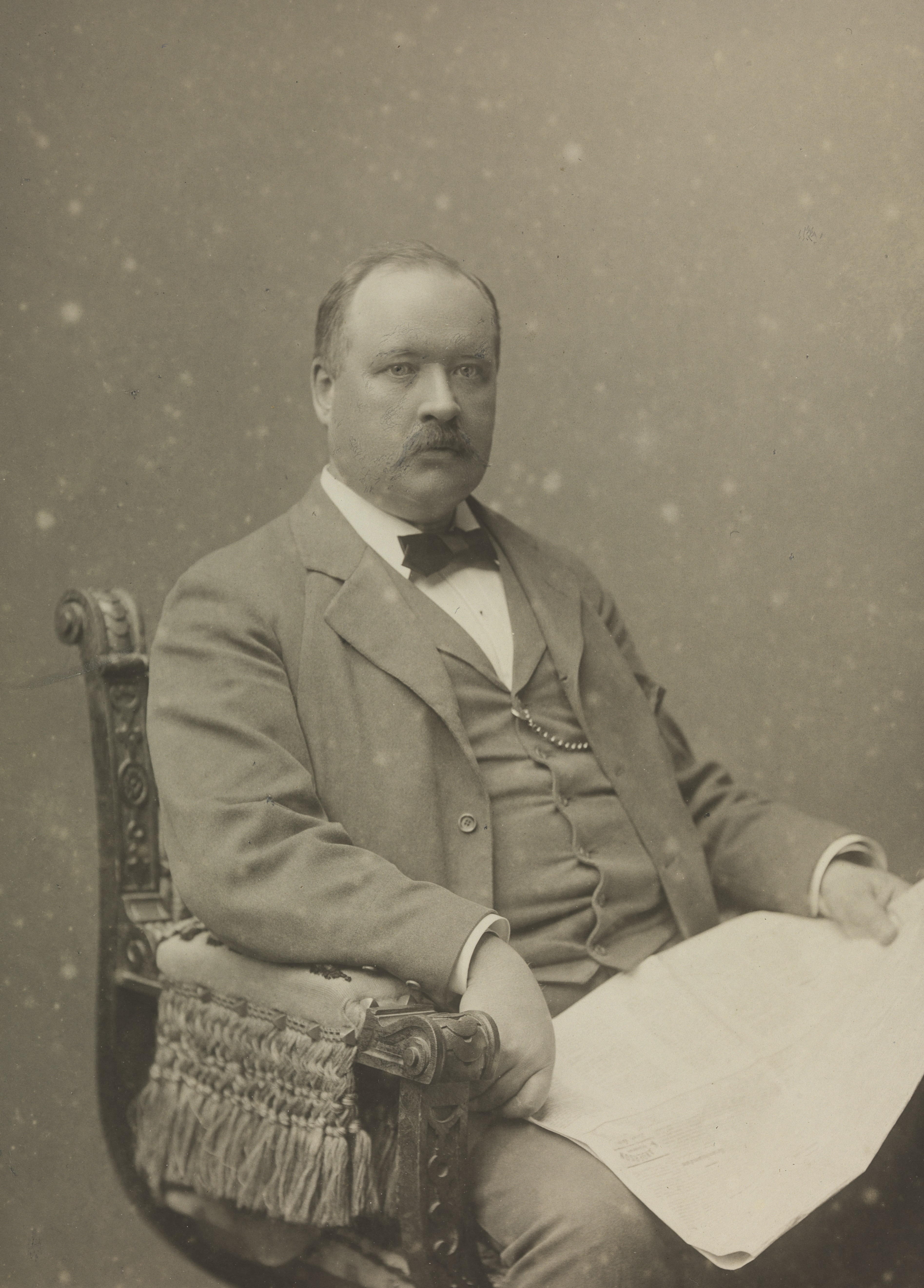 Svante Arctenius, svensk vitenskapsmann. Med dedikasjon. Depicted person: Arctenius, Svante (1859-) Depicted place: Sverige, Stockholm